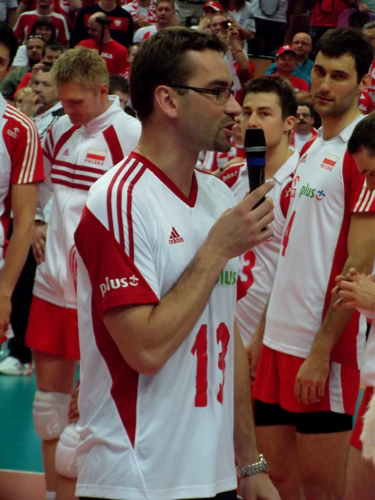 Zdjęcie zrobione podczas zawodów Ligi Światowej 2012 w katowickim Spodku.